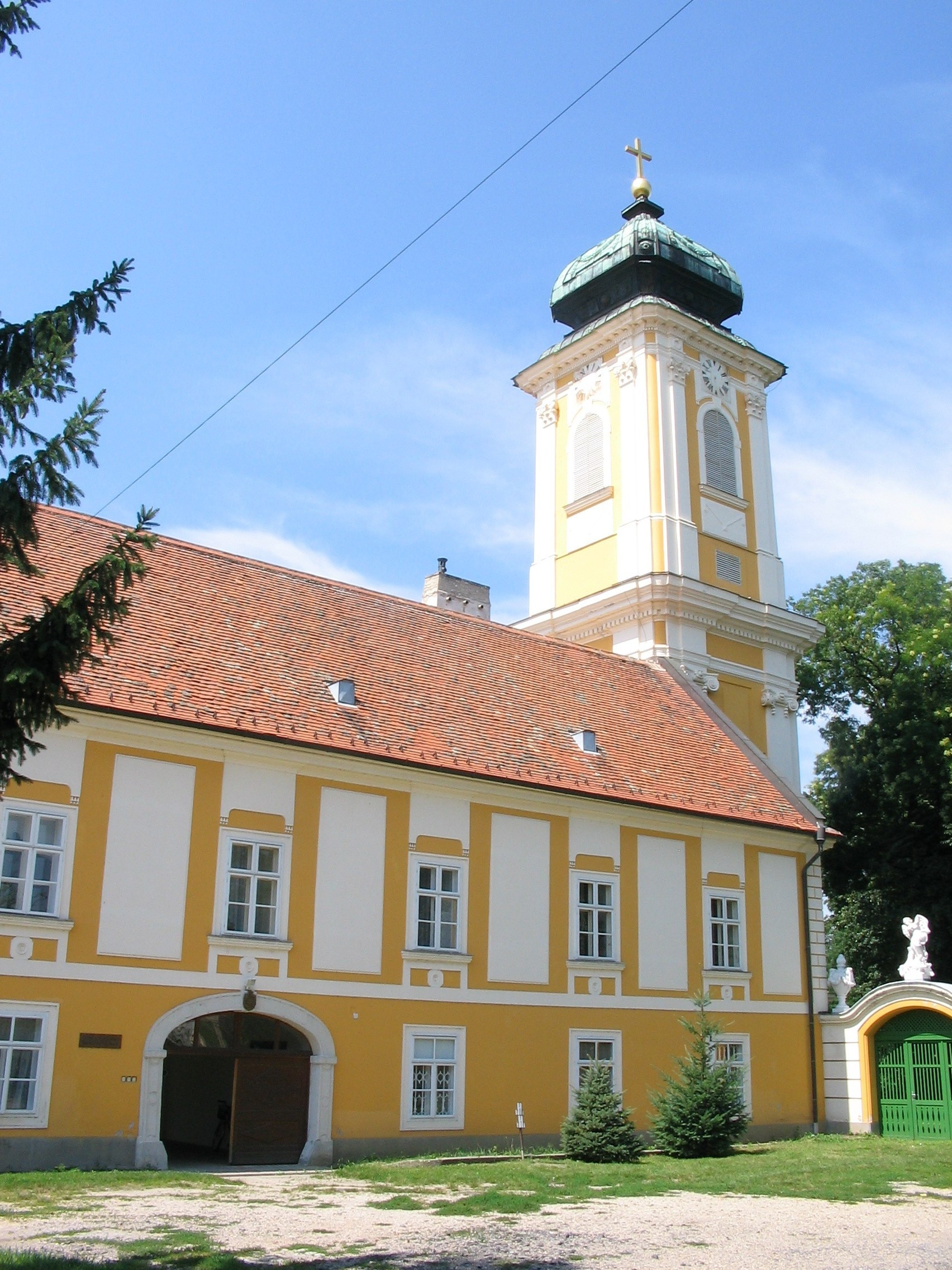 Csornai öregtemplom a premontrei park sarkában. Premontrei Apátság Nagyboldogasszony római katolikus templom